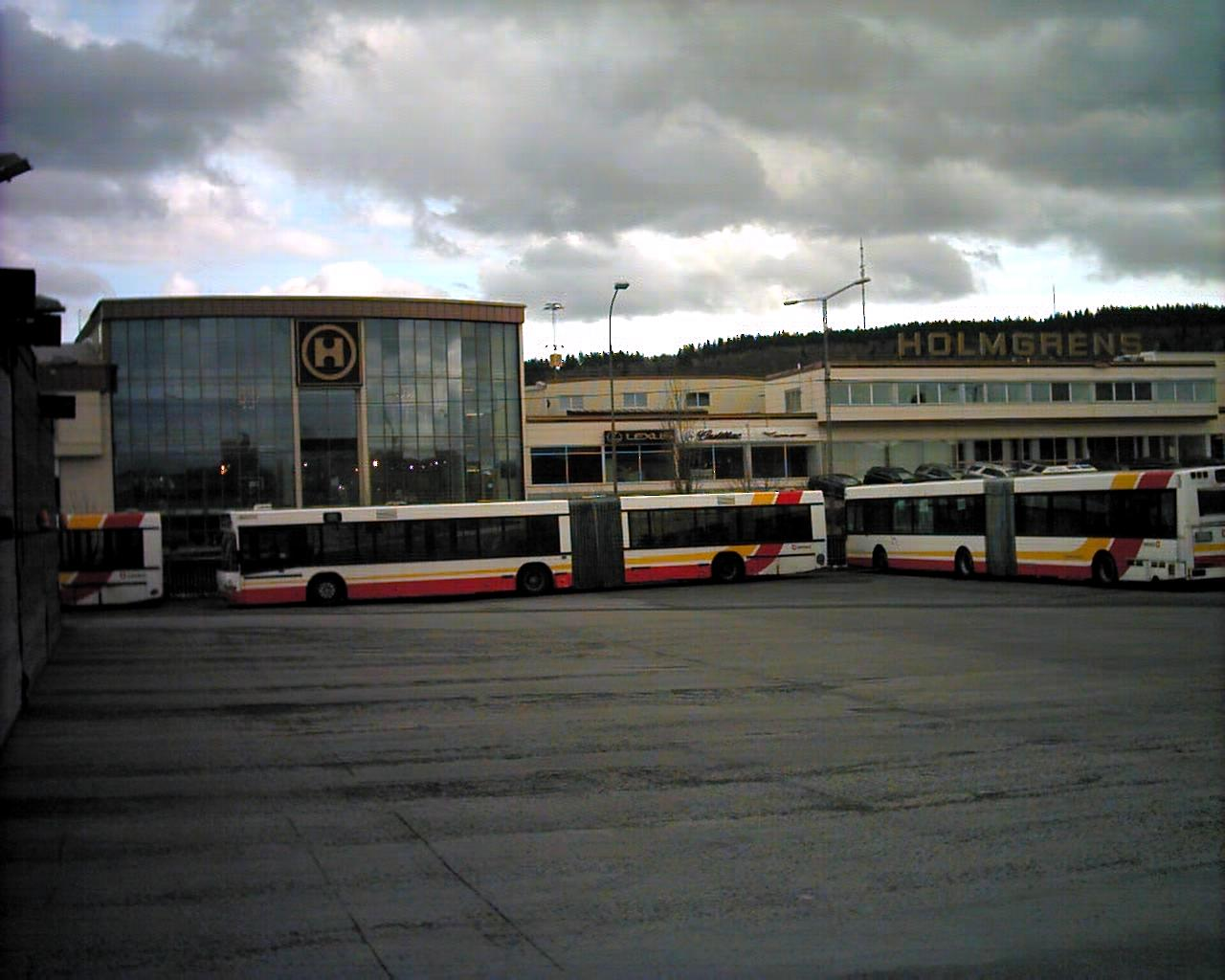 Bussar från Jönköpings förortstrafik. Holmgrens bil i bakgrunden.